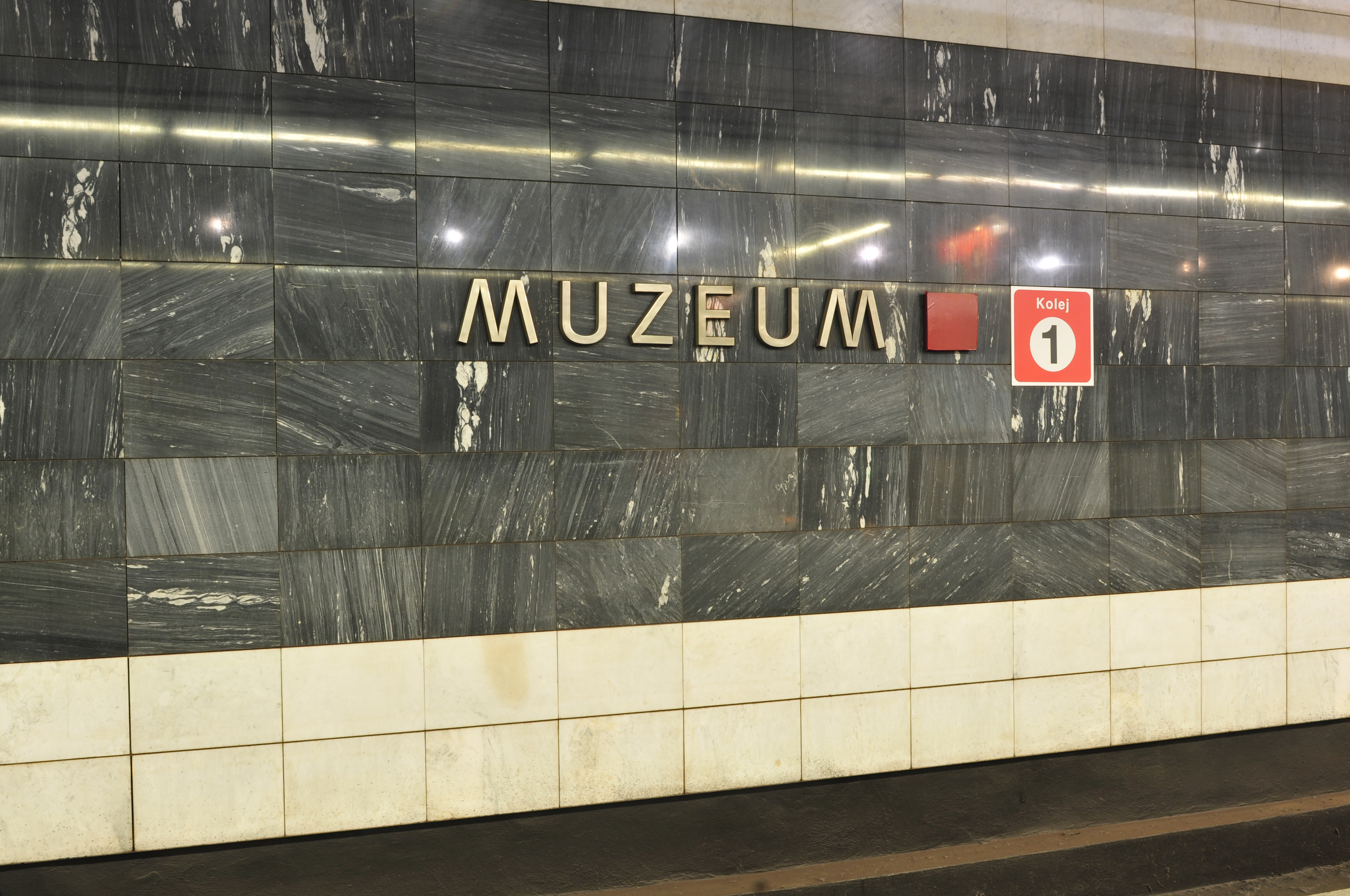 Metro Praha